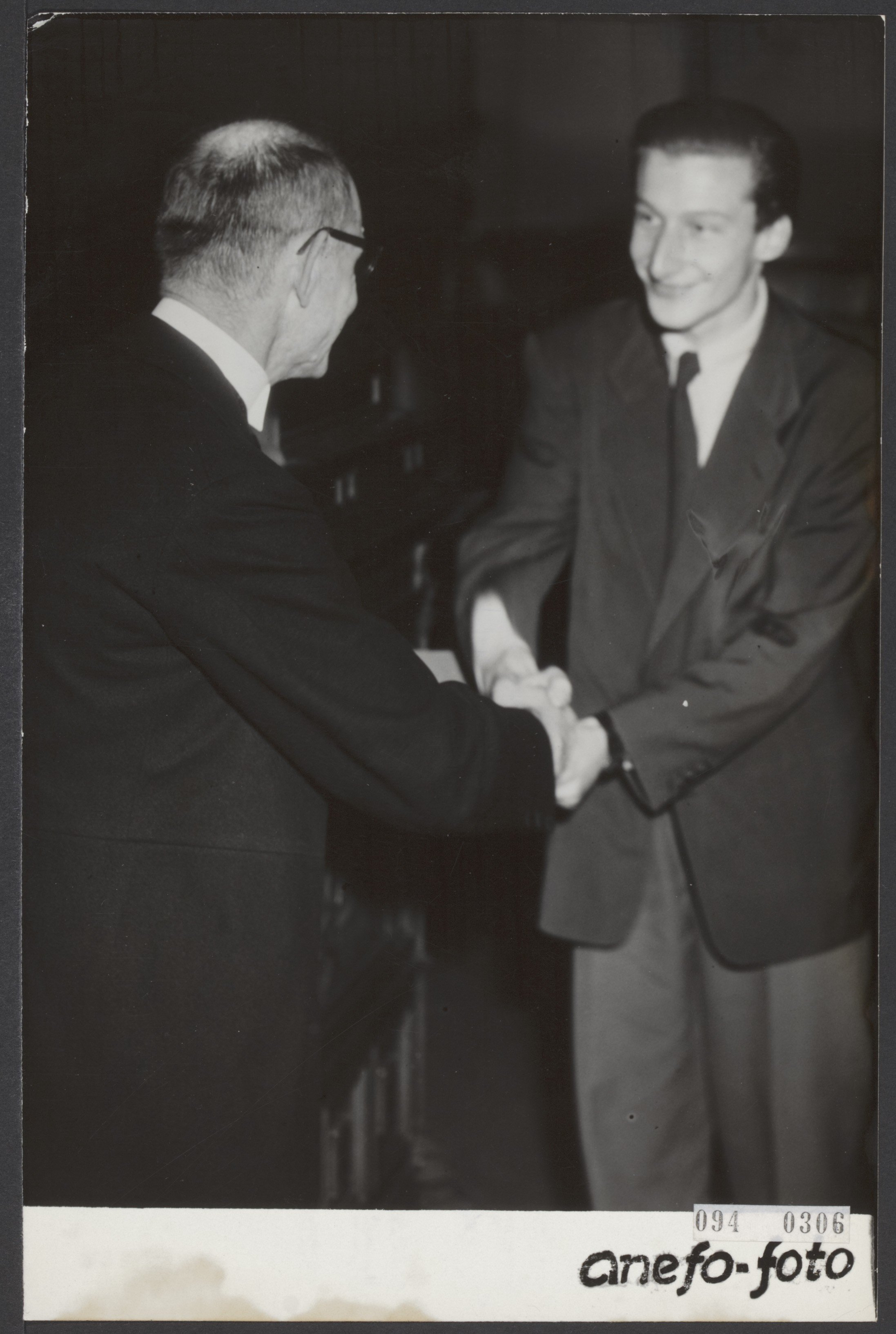 Collectie / Archief : Fotocollectie Elsevier Reportage / Serie : Reina Prinsen Geerligsprijs 1951 Beschrijving : Uitreiking van de Reina Prinsen Geerligsprijs aan de schrijver Harry Mulisch (rechts) door P.J. Prinsen Geerligs Datum : 1951 Locatie : Amsterdam, Noord-Holland Trefwoorden : auteurs, literatuur, prijsuitreikingen, schrijvers Persoonsnaam : Mulisch, Harry, Prinsen Geerligs, P.J. Fotograaf : Duinen, […] van / Anefo Auteursrechthebbende : Nationaal Archief Materiaalsoort : Foto (zwart/wit) Nummer archiefinventaris : bekijk toegang 2.24.05.02 Bestanddeelnummer : 094-0306